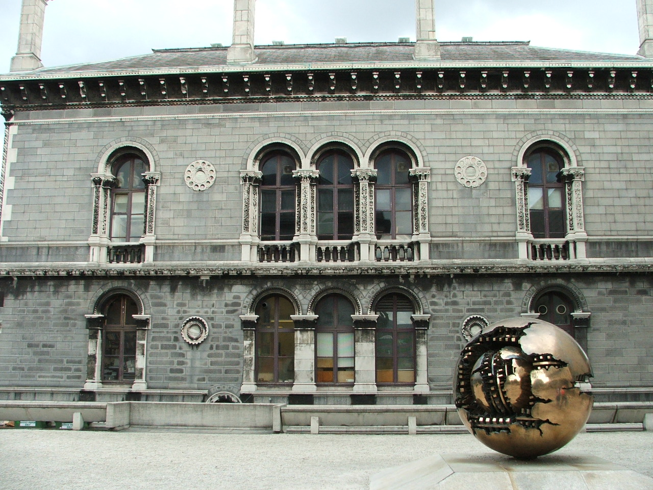 "Scultura di Arnaldo Pomodoro posta davanti al Trinity College"